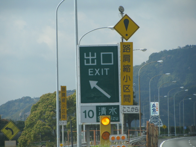 2009年4月1日、清水インター付近で撮影。奥が名古屋方面